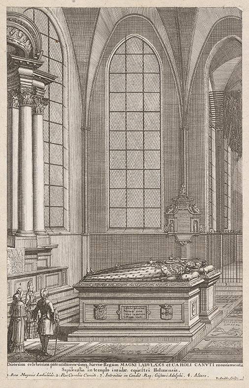 Duorum celebrium potentissimorumque Sueciae Regum Magni Ladulåås et Caroli Canuti monumenta Sepulcralia in templo insulae equestri Holmensis : [Bild] / W. Swidde Sculp.